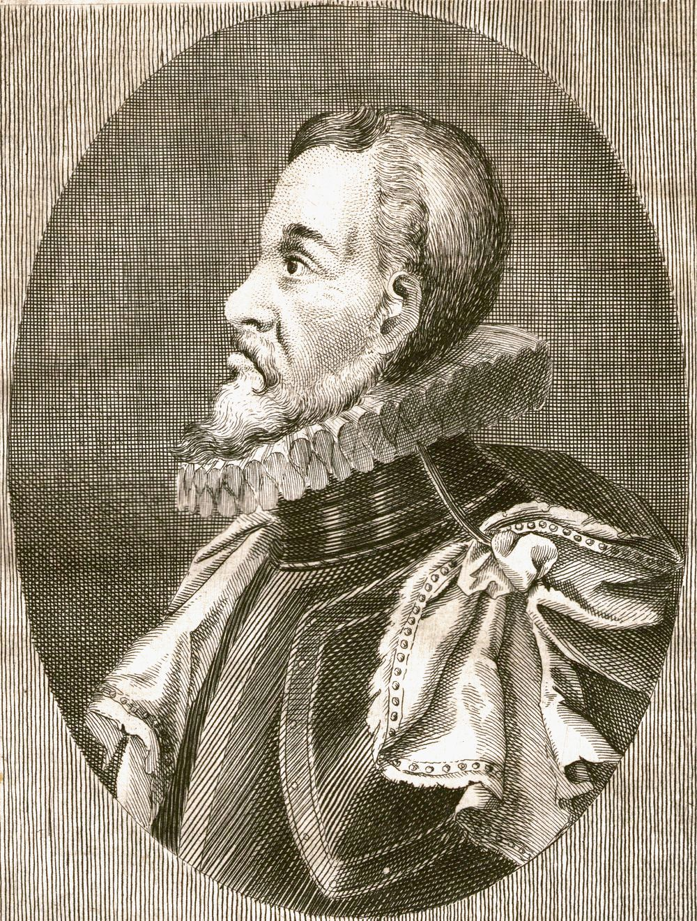 Karol II Podiebradowicz